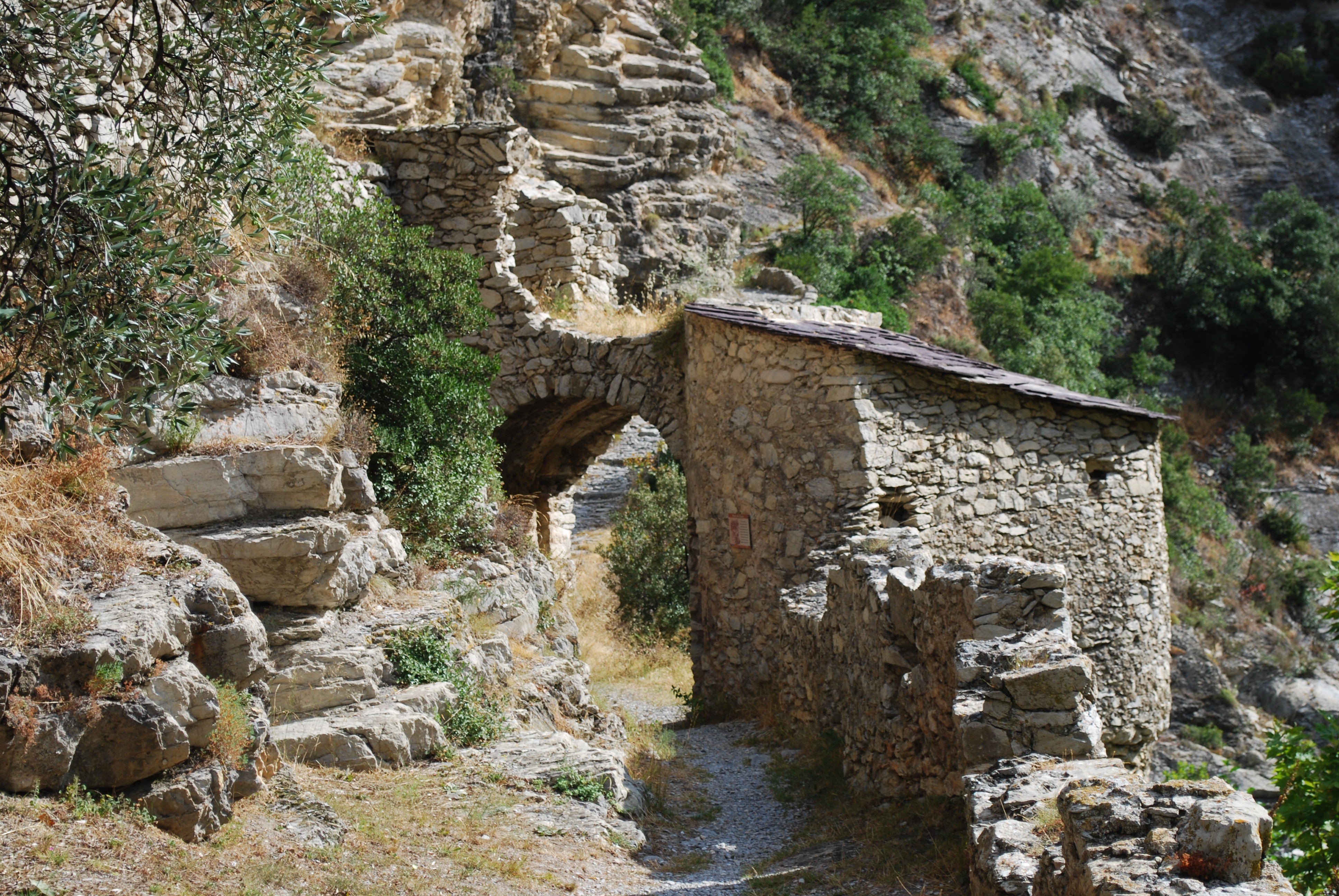 Portes de Gênes, à Breil-sur-Roya, dans les Alpes-Maritimes, en France (photo prise par dsch67).